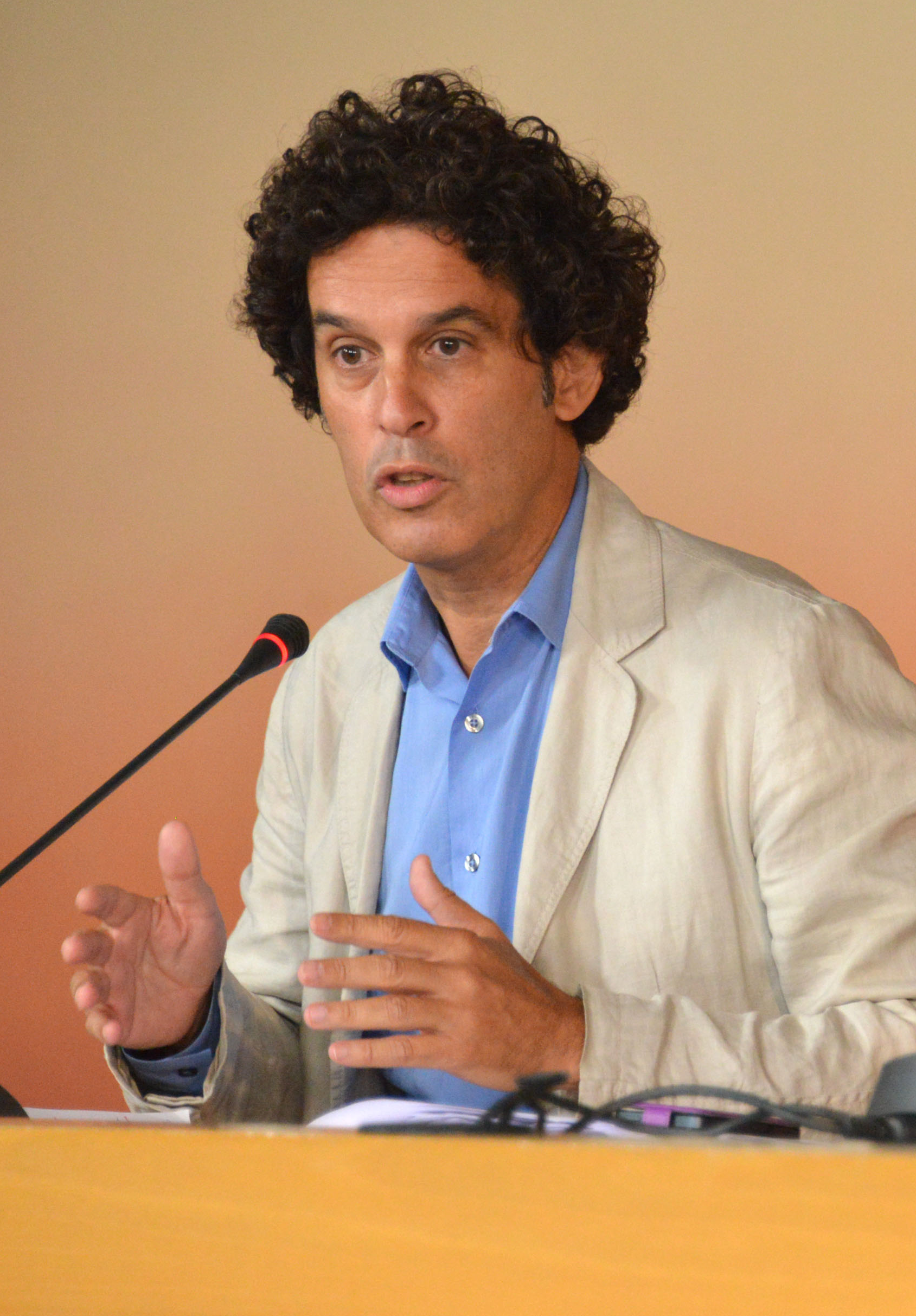 Pedro Zerolo en una rueda de prensa realizada el 24 de septiembre de 2013.